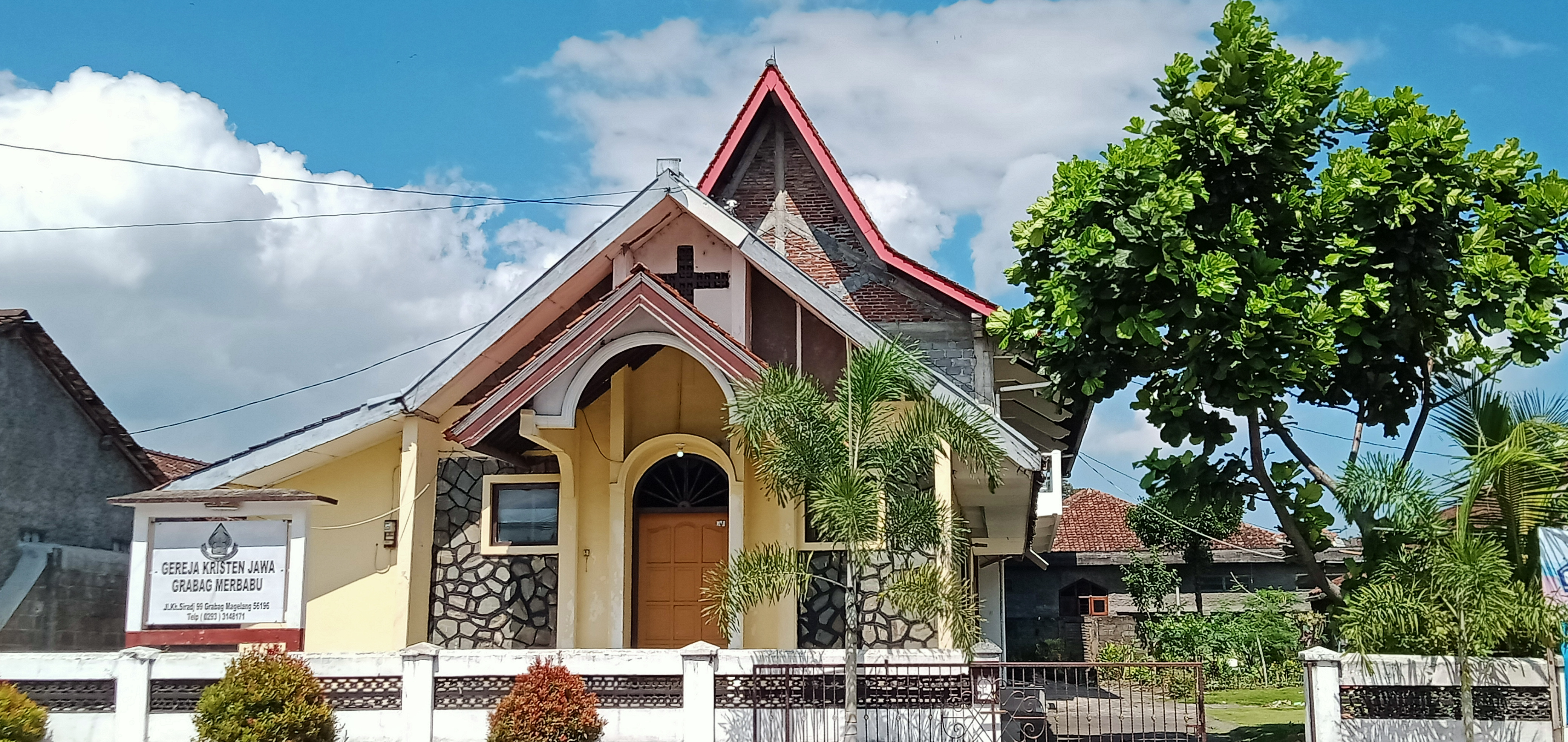 GKJ Grabag Merbabu